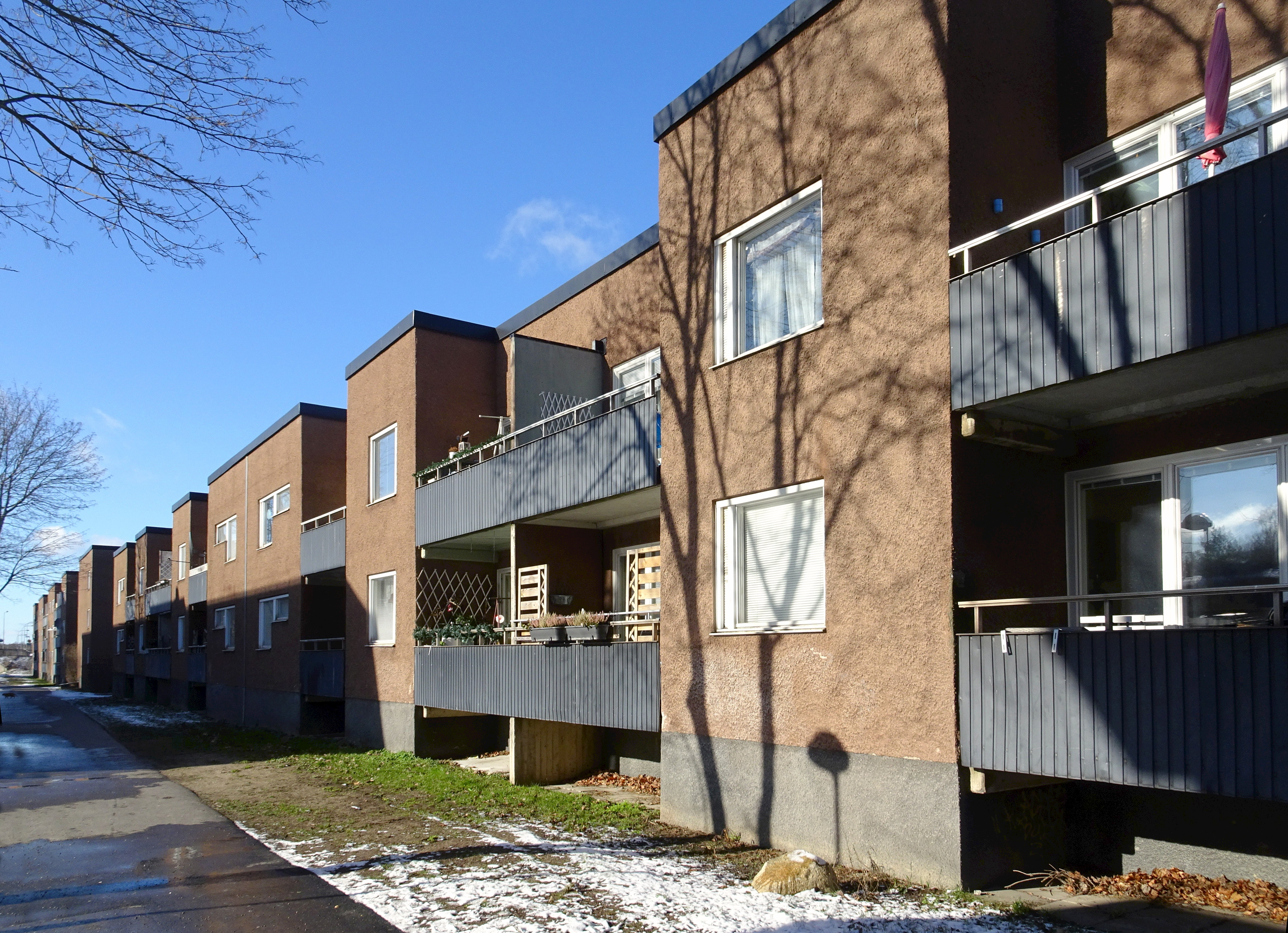 Kvarteret Bergholmen, Vårberg, Kjell Abramson arkitektkontor AB (Britta och Kjell Abramson) 1965-1967